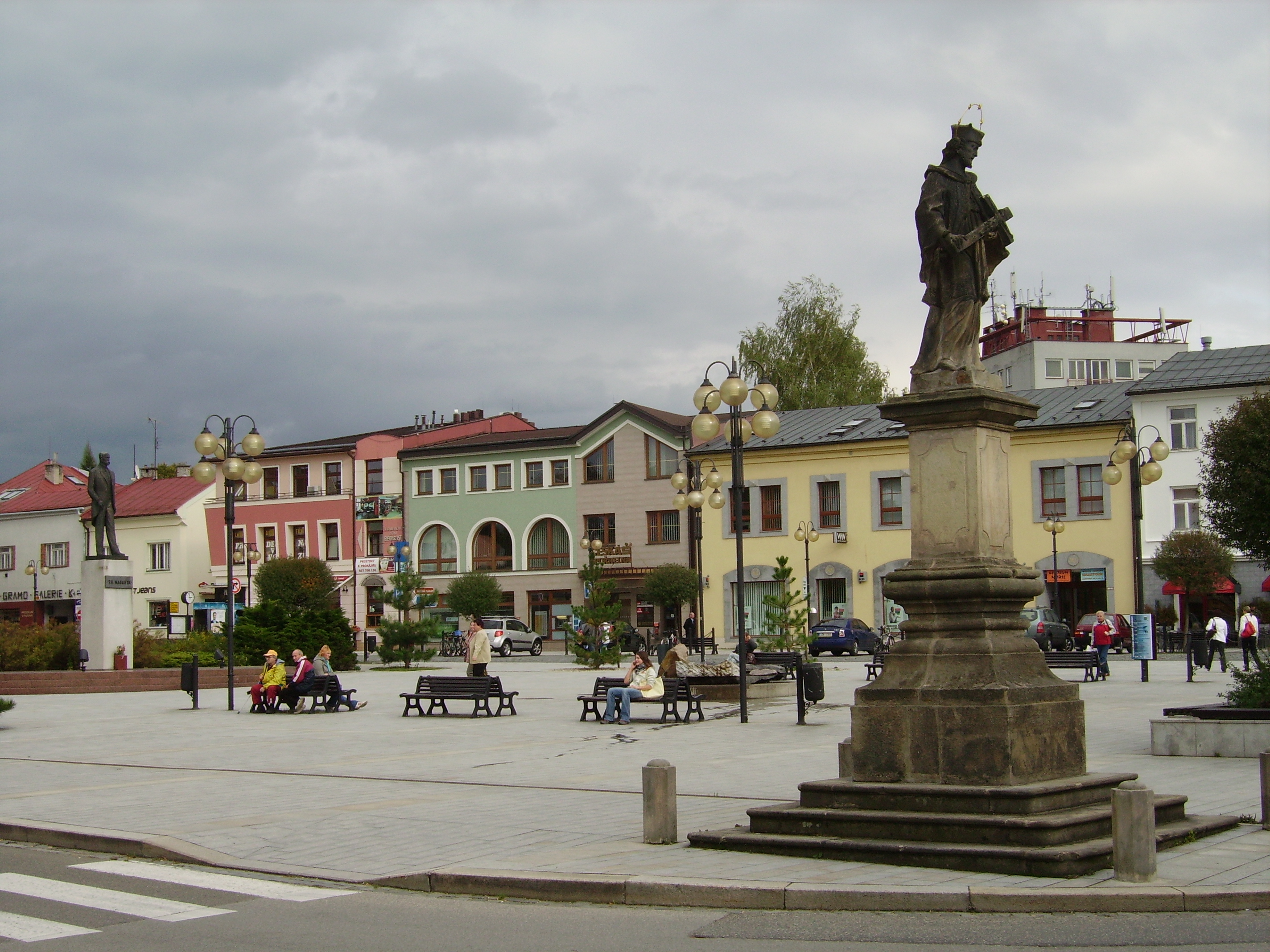 Rožnov pod Radhoštěm, hlavní náměstí